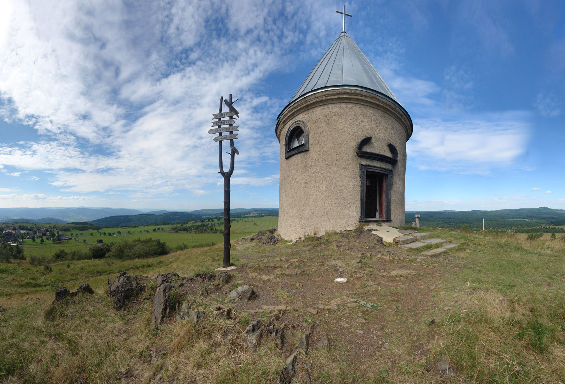 Kaple Neposkvrněného početí P. Marie (Měděnec), návrší S od obce, Měděnec